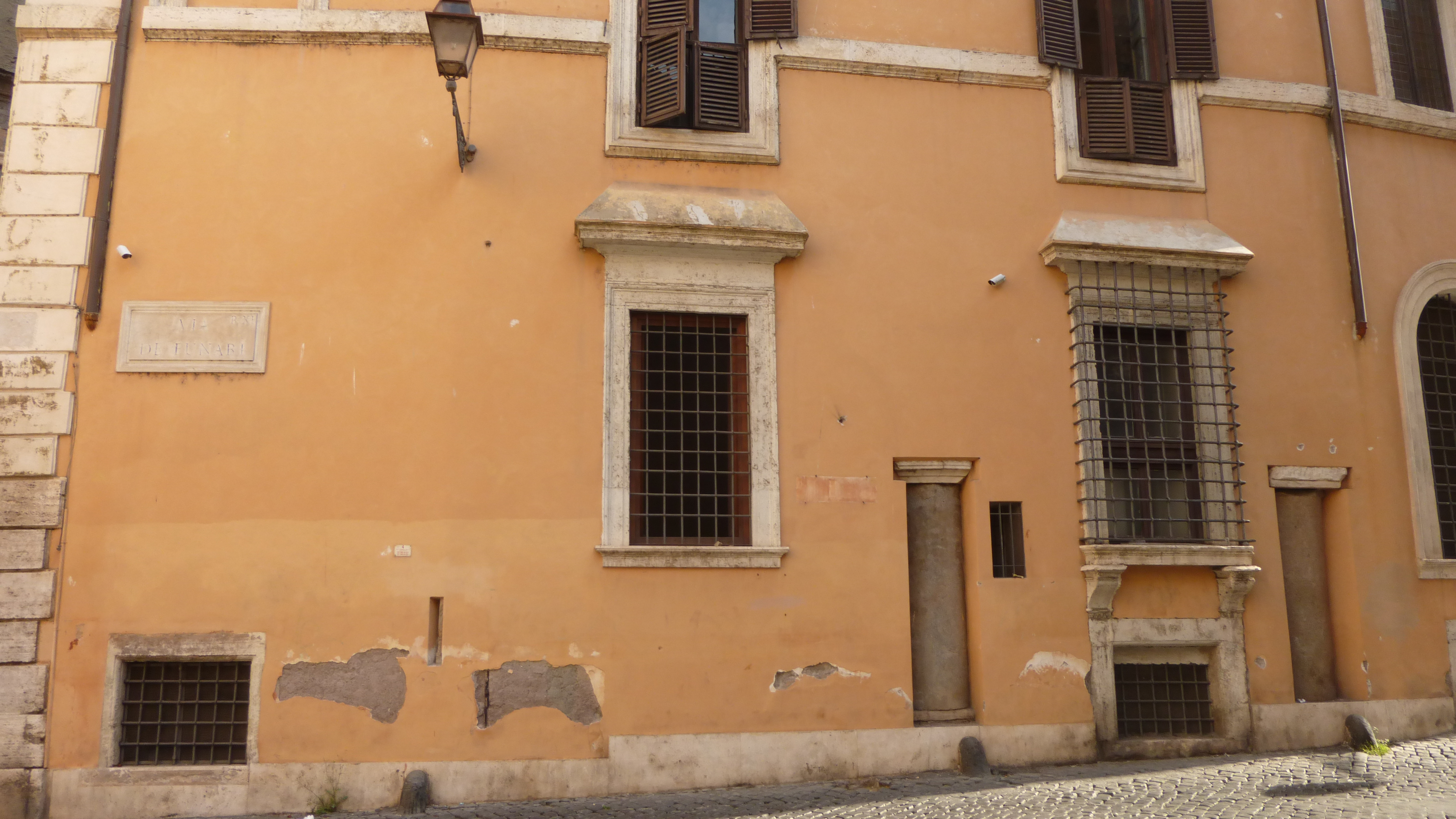 Roma via dei Funari, colonne inglobate nel fianco di palazzo Patrizi